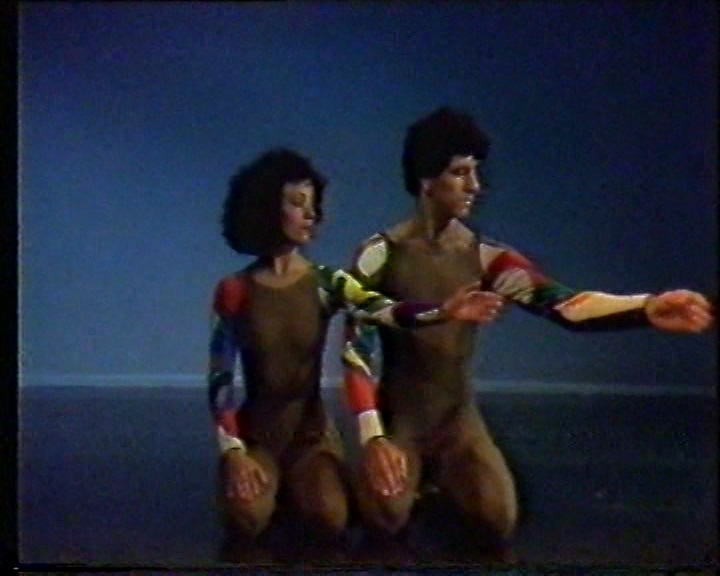 המחול אנדרטה מאת רונית לוי וייס